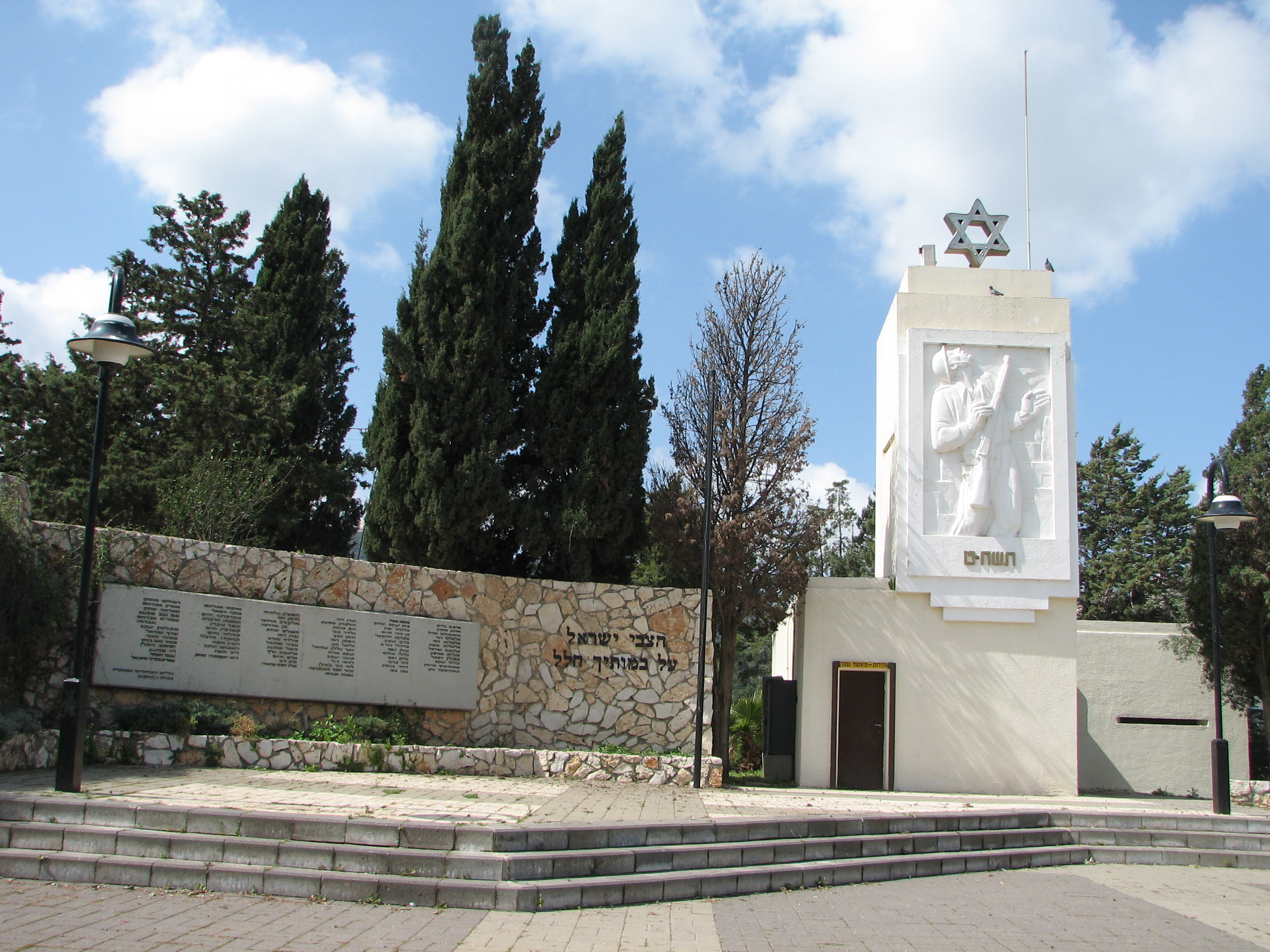 The City Nesher on Mount Carmel and Suburb:Givat Nesher תמונות משכונותיה של העיר נשר, גבעת נשר, האנדרטה לחללי מלחמות ישראל לתושבי נשר בגבעת נשר. במאורעות 1936-1939 מבנה זה שימש כעמדה מבוצרת להגנה על שכונת נשר שלמרגלות הגבעה